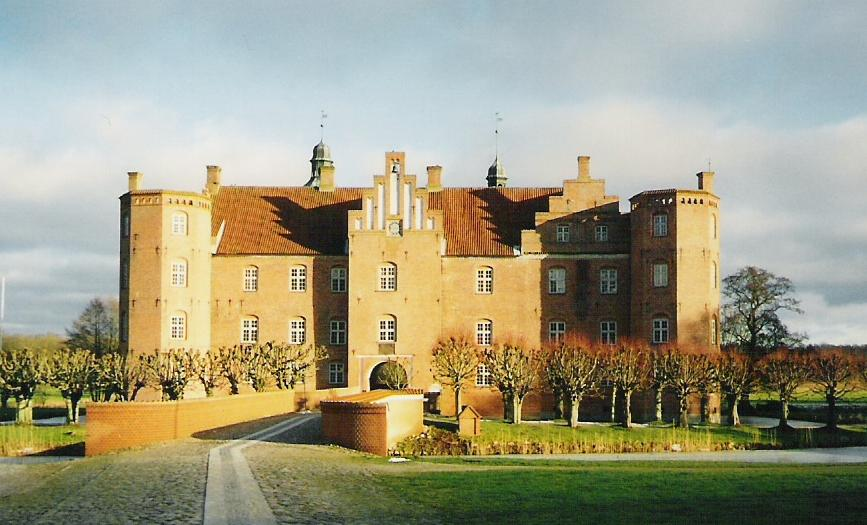 Foto af herregården Gammel Estrup på Djursland. Taget i vinteren 2000-2001